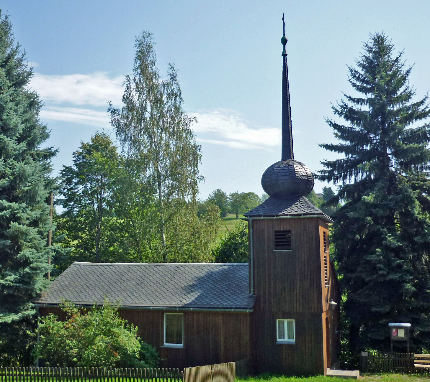 Kapelle in Bielatal-Hermsdorf im Elbsandsteingebirge, 1949 errichtet